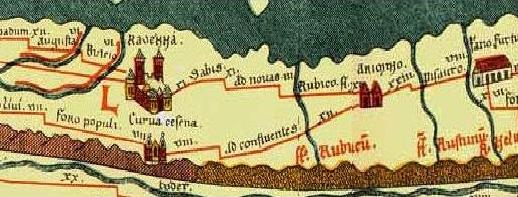 Extrait Ravenna-Rimini de la "Tavola Peutingeriana"